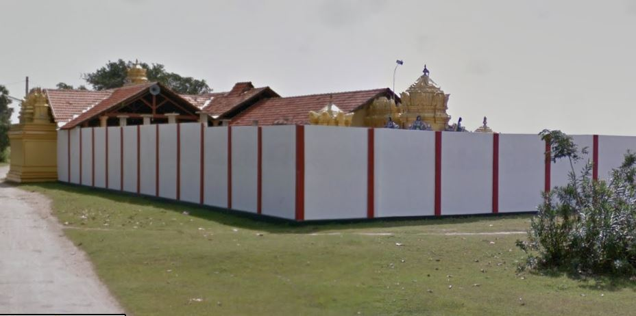 பின்புறம் கூகுளில்